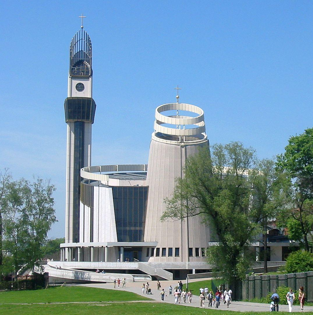 Zewnętrzny widok kościoła od strony wschodniej.